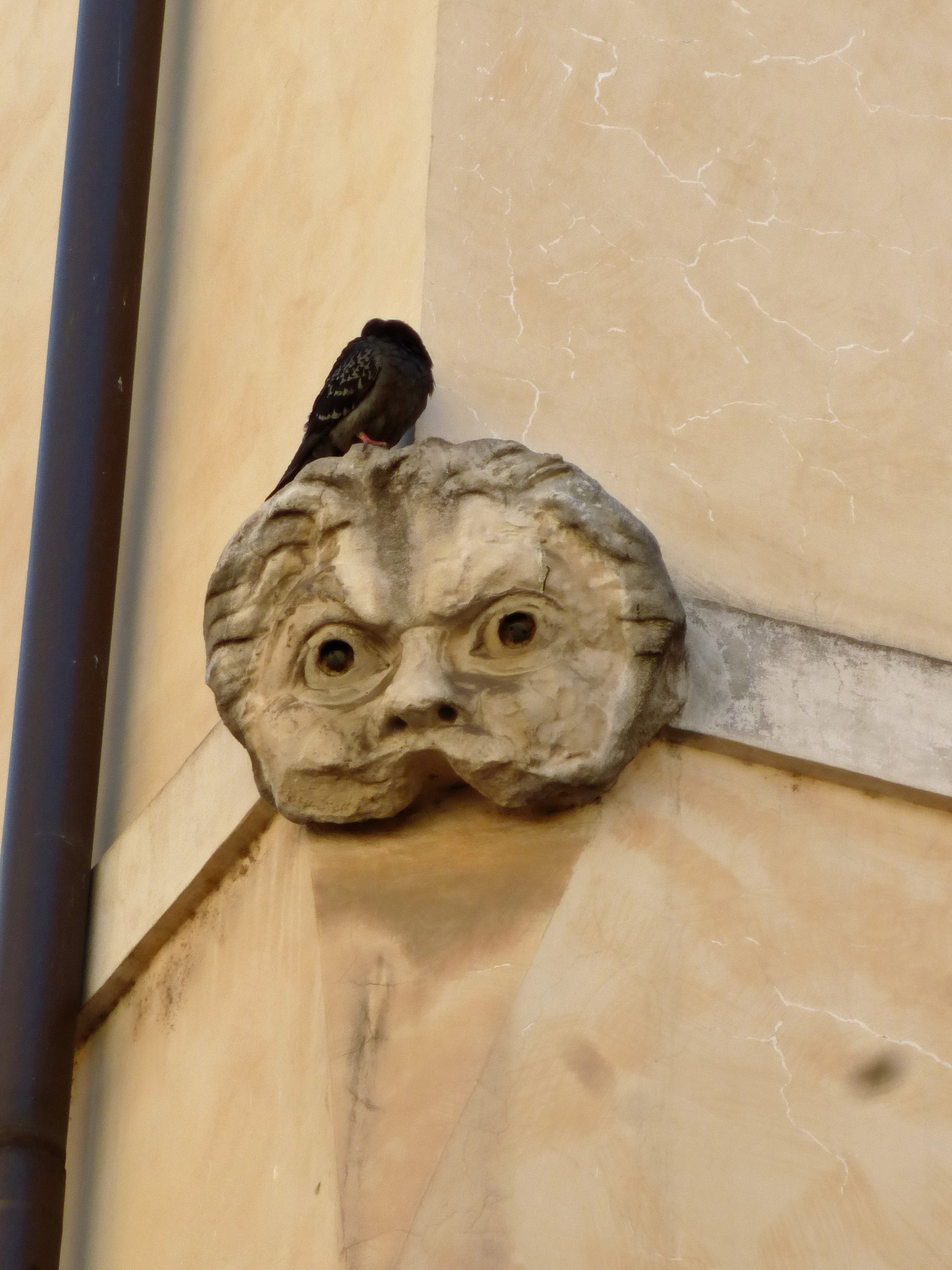 Roma, piazza Pollarola. Maschera dal Teatro di Pompeo murata sul cantone di una casa d'angolo in piazza Pollarola